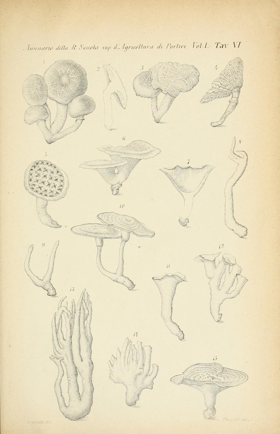 Descrizione della tavola a pag. 79 della fonte. Fig. 1. Agaricus Aegirita Brig. [Fig.] 2. Sezione dello stesso [Fig.] 5. Agaricus Aegirita Brig. var. Strobiloides [Fig.] 3-4. Forme di passaggio tra l'A.Aegirita e la sua varietà. [Fig.] 6. Forma normale del Polyporus Tuberaster Fr. ottenuta a luce diffusa. [Fig.] 7. Sezione dello stesso. [Fig.] 8-9. Forme anormali ottenute portando al buio la pietra fungaja che aveva prodotto il fungo della fig. 6. [Fig.] 10. Lo stesso fungo della fig. 9 portato alla luce, ove all'apice a ha sviluppato un cappello regolare. [Fig.] 11-14. Forme anormali del fungo di un'altra pietra fungaja tenuta al buio. [Fig.] 15. Forma normale di detto fungo che ha prodotta la stessa pietra quando dal buio è stata portata alla luce.